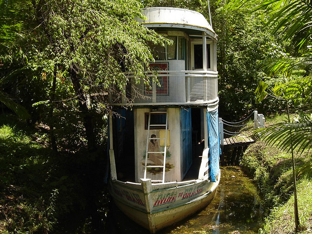 Museu Sacacá, em Macapá, Amapá, Brasil. Foto de Marcus Paulo tirada em 30 de dezembro de 2005.